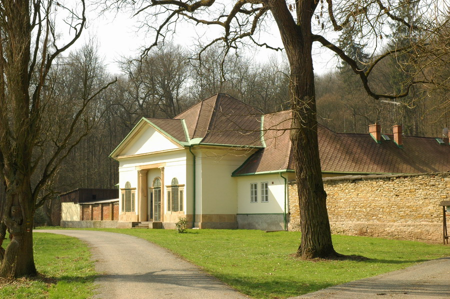 Ratibořice; lovecký zámeček